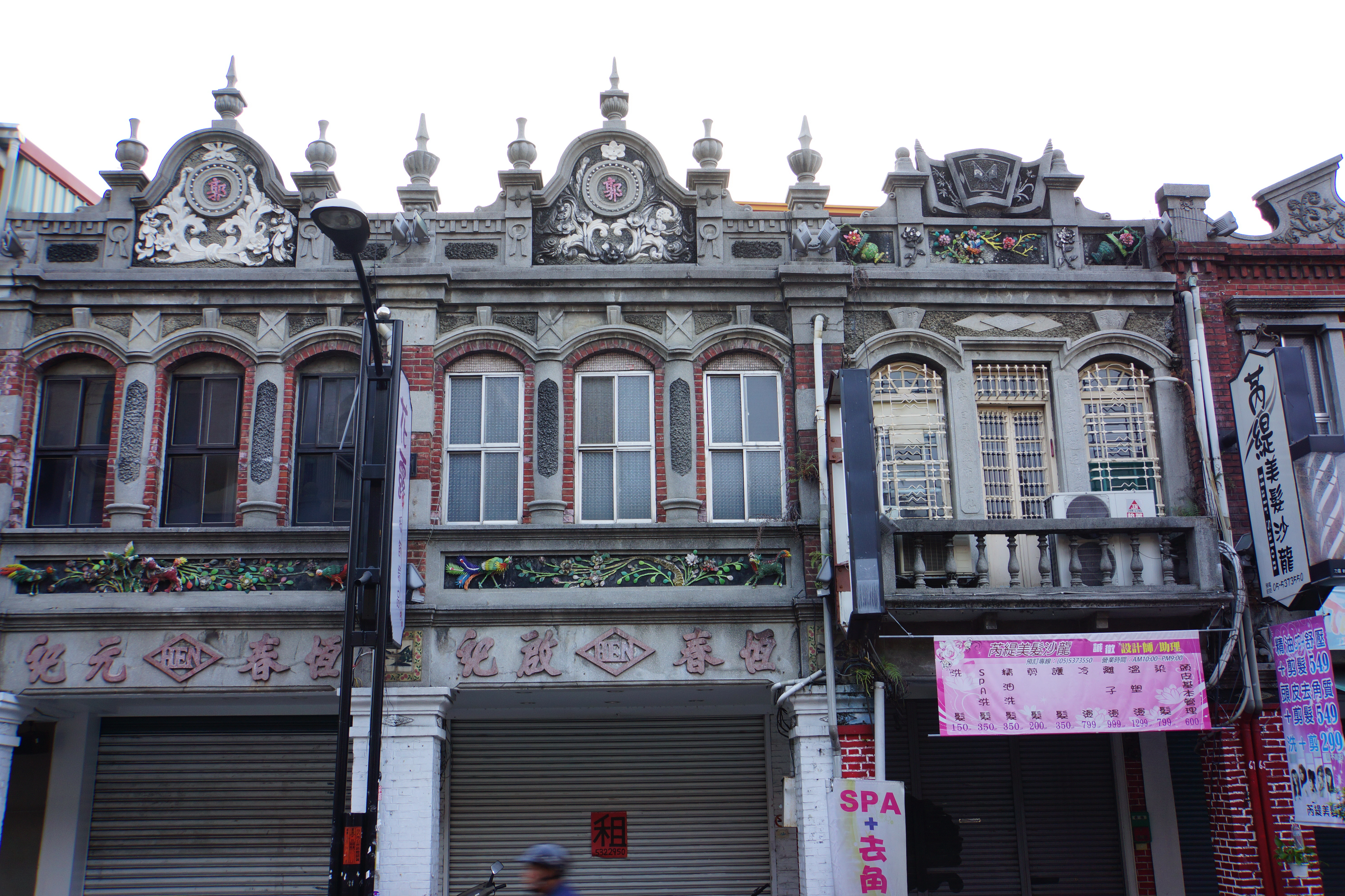 太平老街 Taiping Street